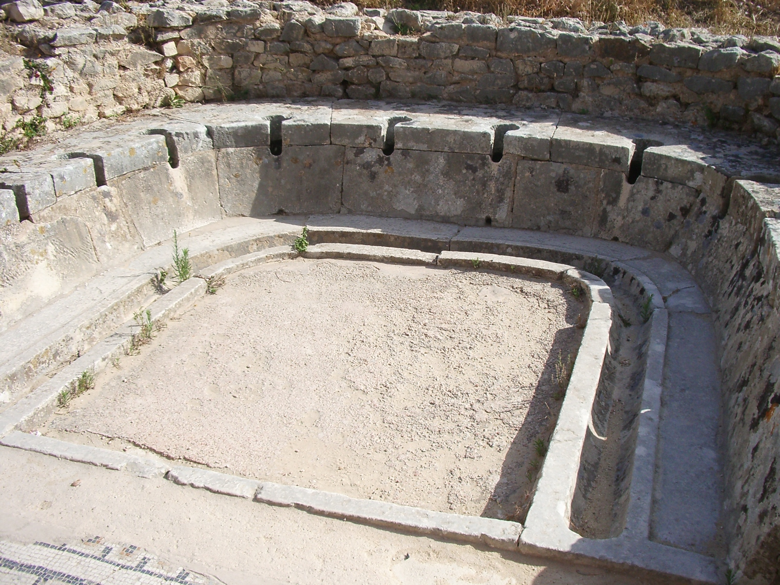 Dougga banys